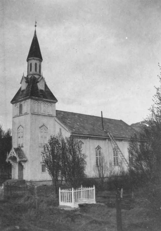 Nordreisa kirke (church) in Nordreisa, Norway